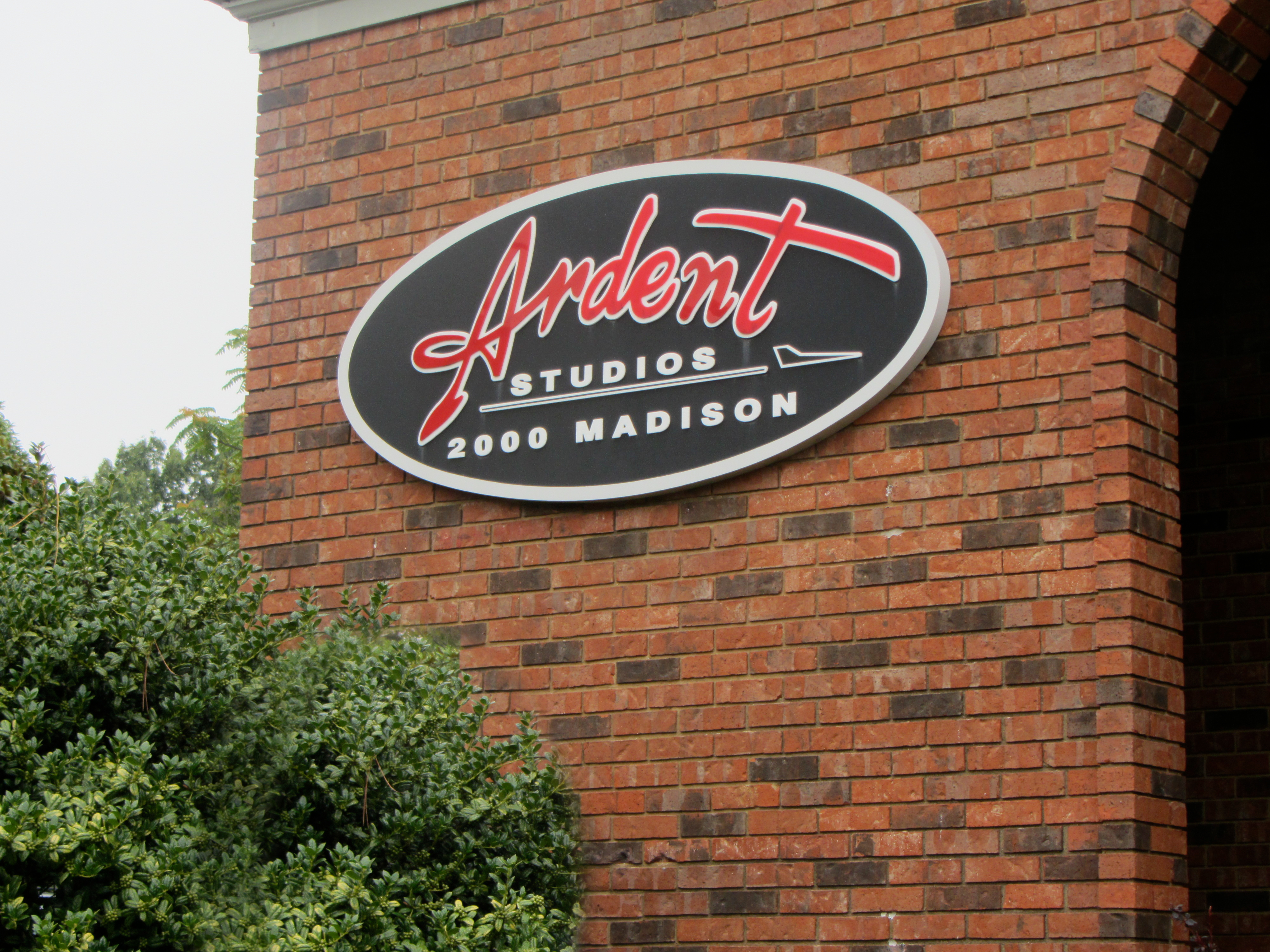 me outside ardent studios.